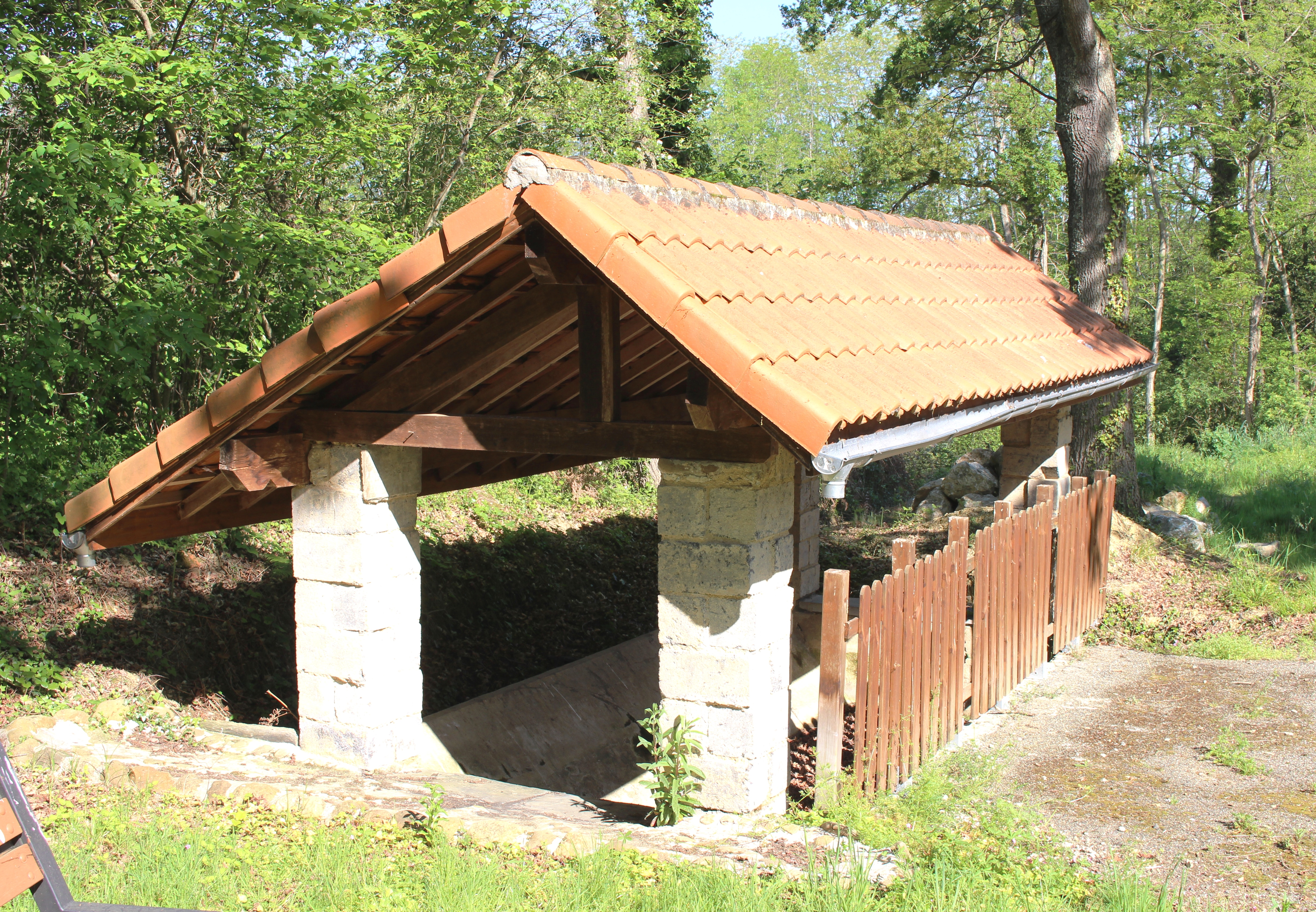 Lavoir de Calavanté (Hautes-Pyrénées)